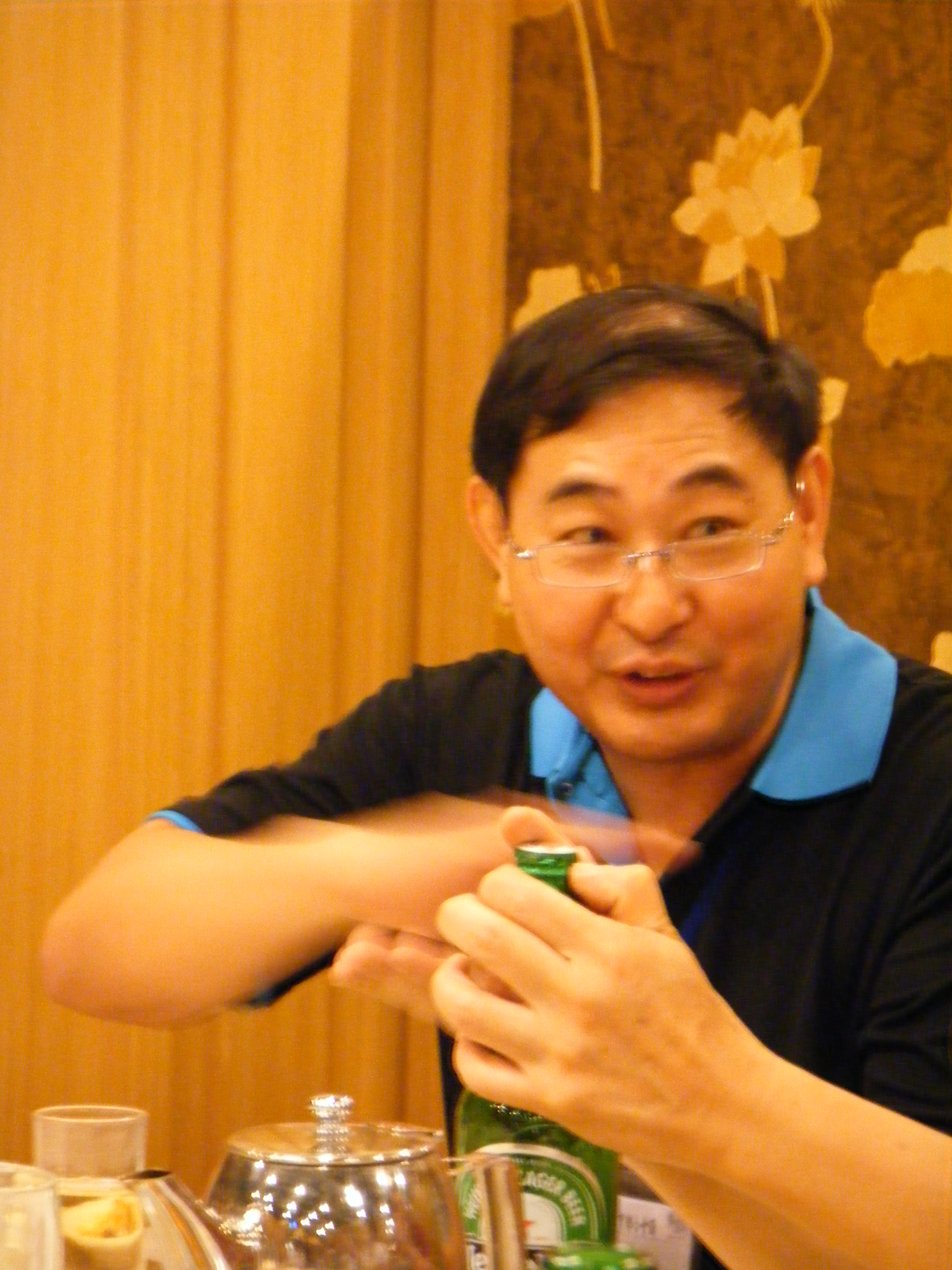 中華民國陸軍軍官學校物理學系教授兼中華民國物理教育學會第29屆理事長洪偉清，於臺南市。